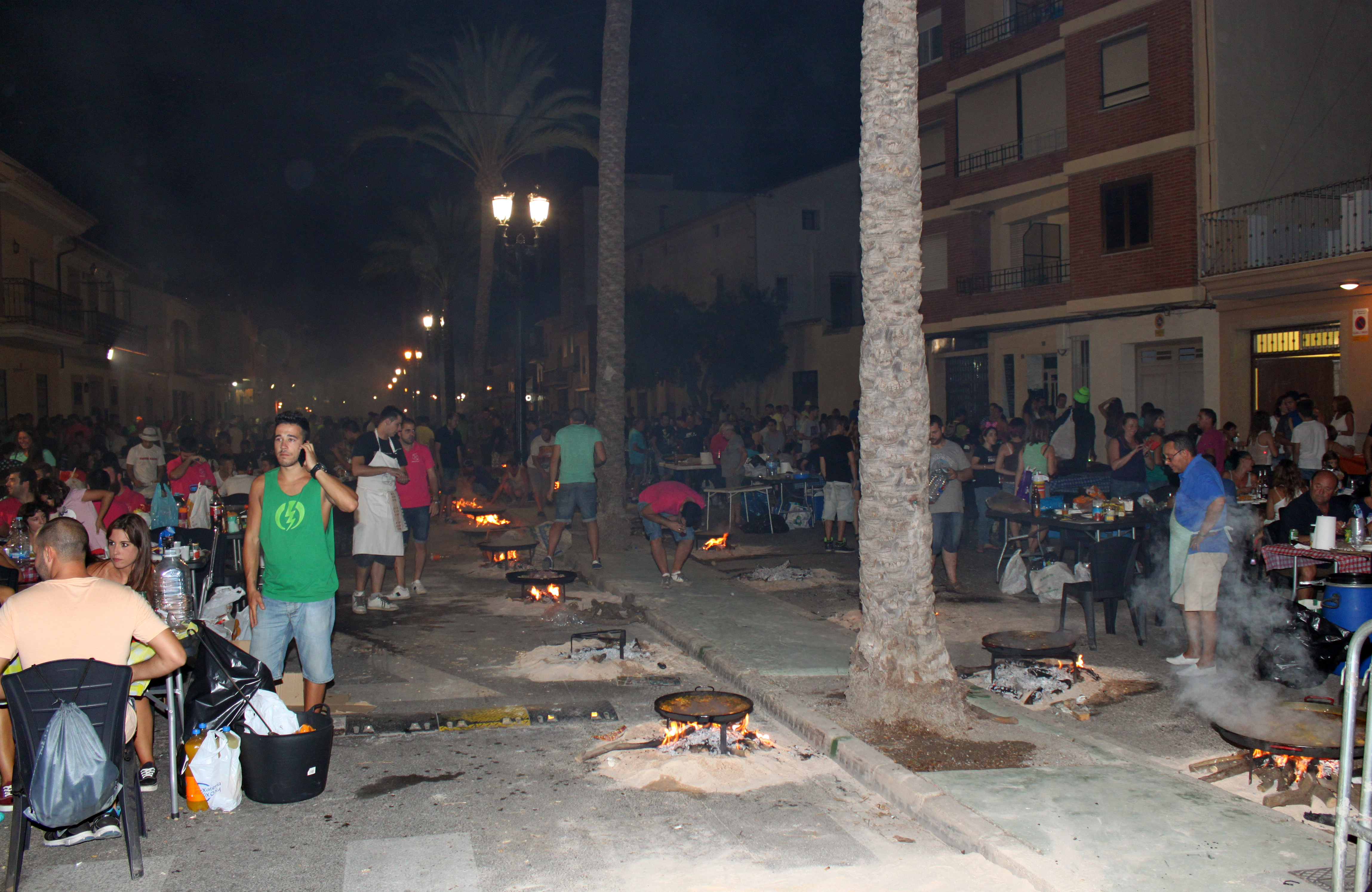 calle Magdalena